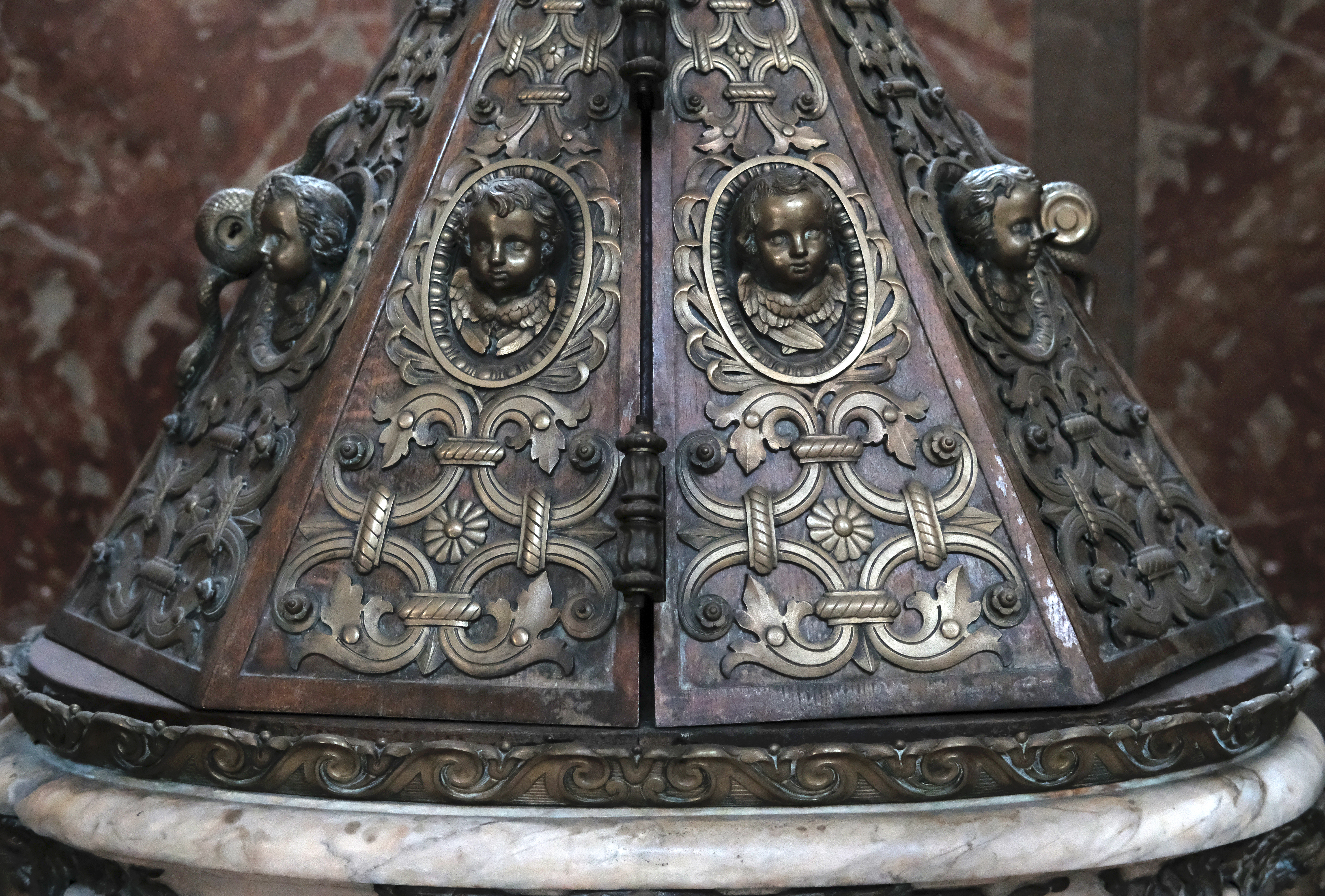 Église Saint-Roch (cuve baptismale) - Paris Ier